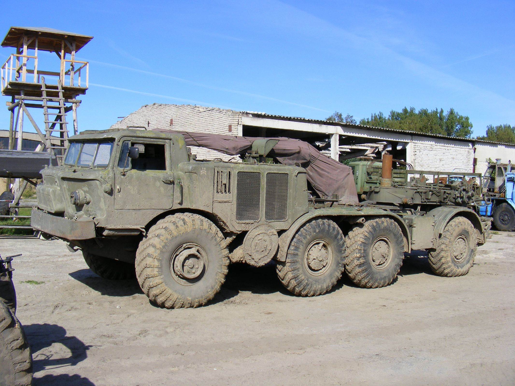 ZiL-135LMP im Technik-Museum Pütnitz.